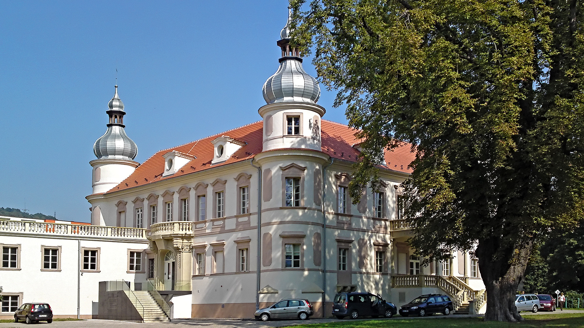 Zámek Krásné Březno, Krásné Březno 1